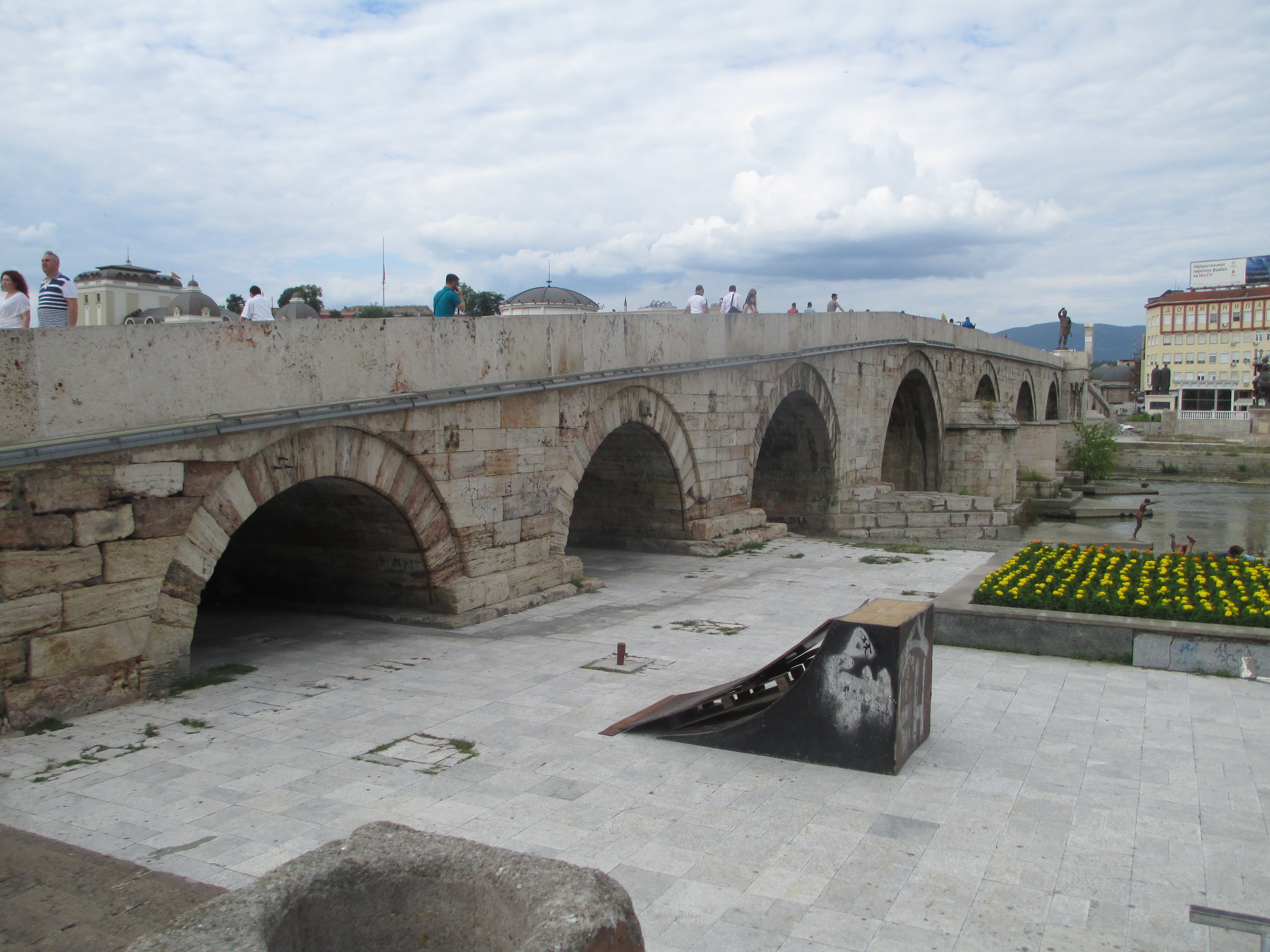 גשר האבן בסקופיה